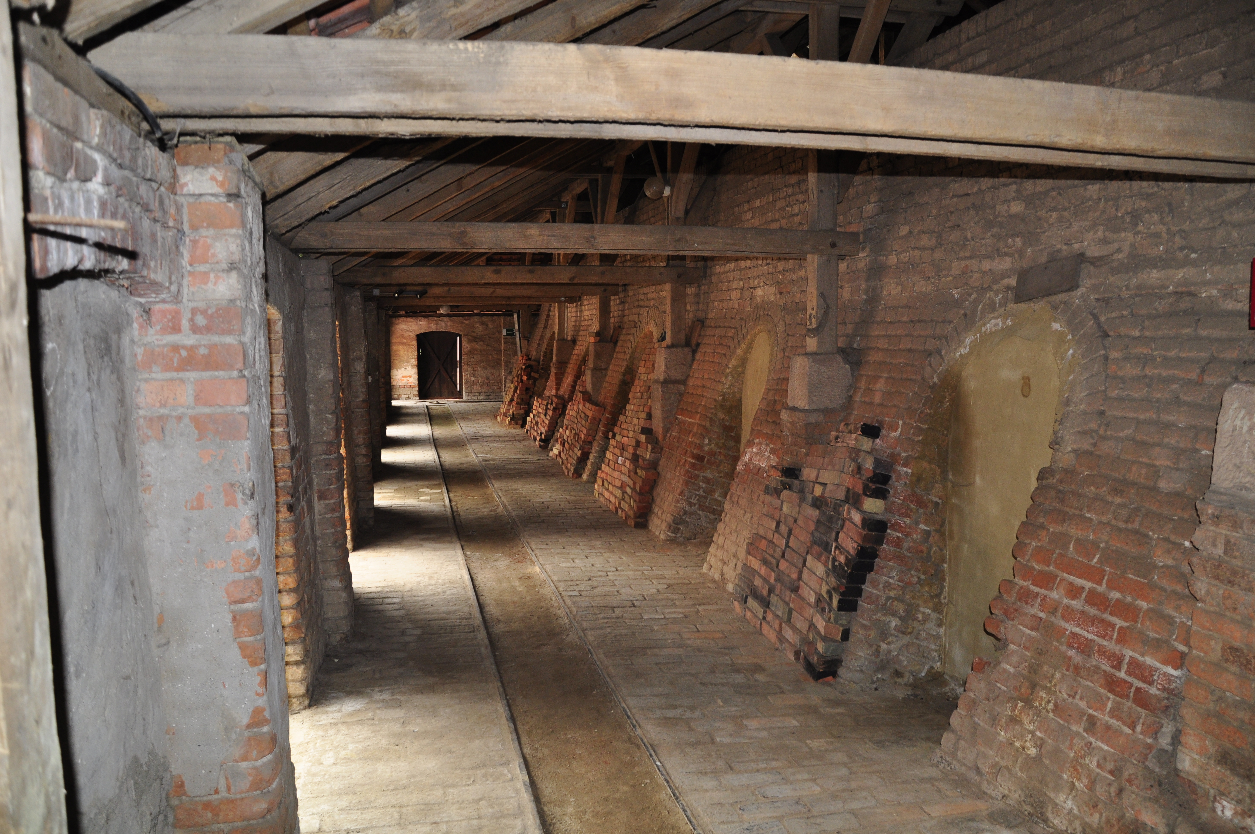 Ziegelei Hundisburg, Zick-Zack-Ofen